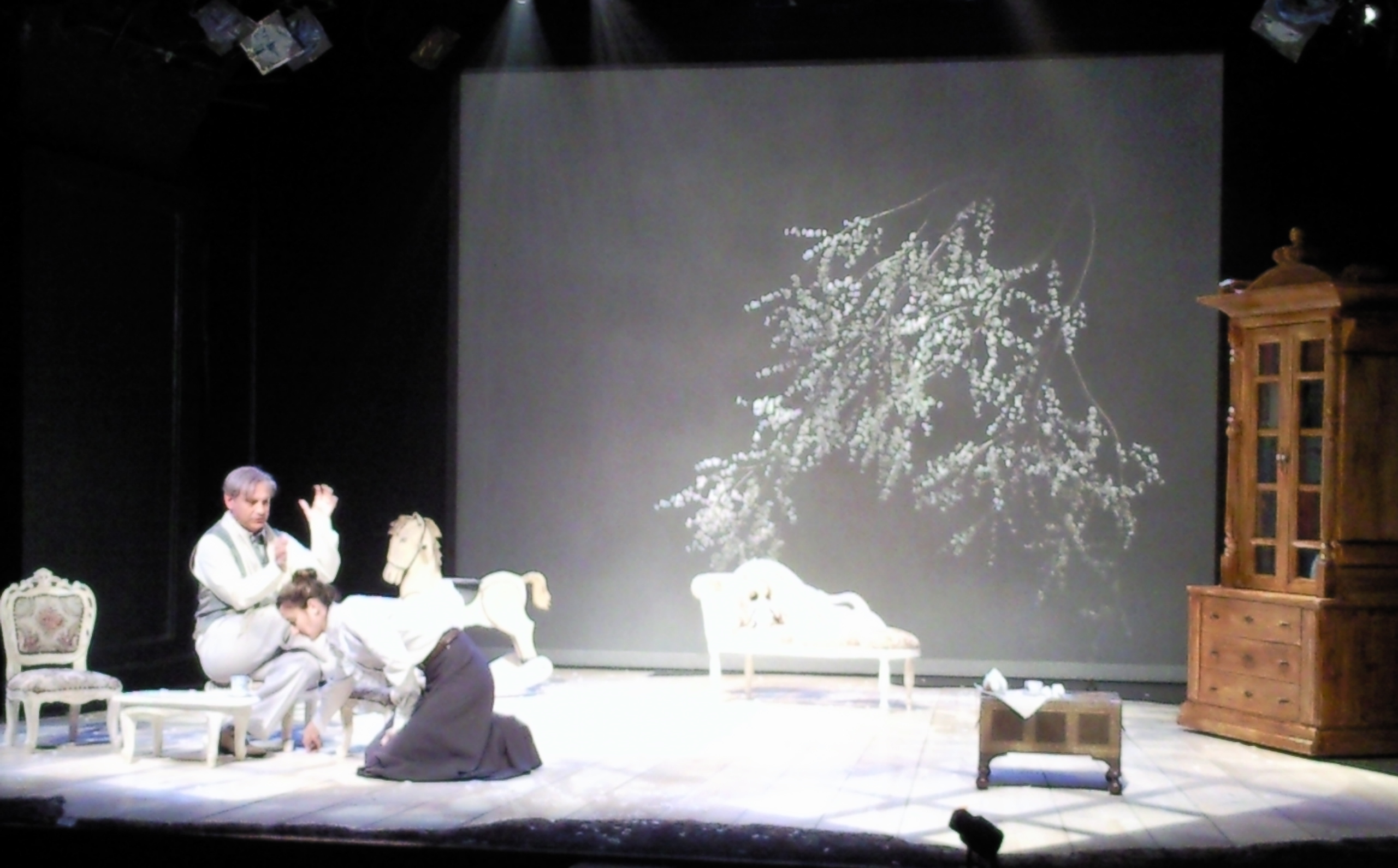 תפאורה של סבטלנה ברגר להצגת גן הדובדבנים בתיאטרון החאן